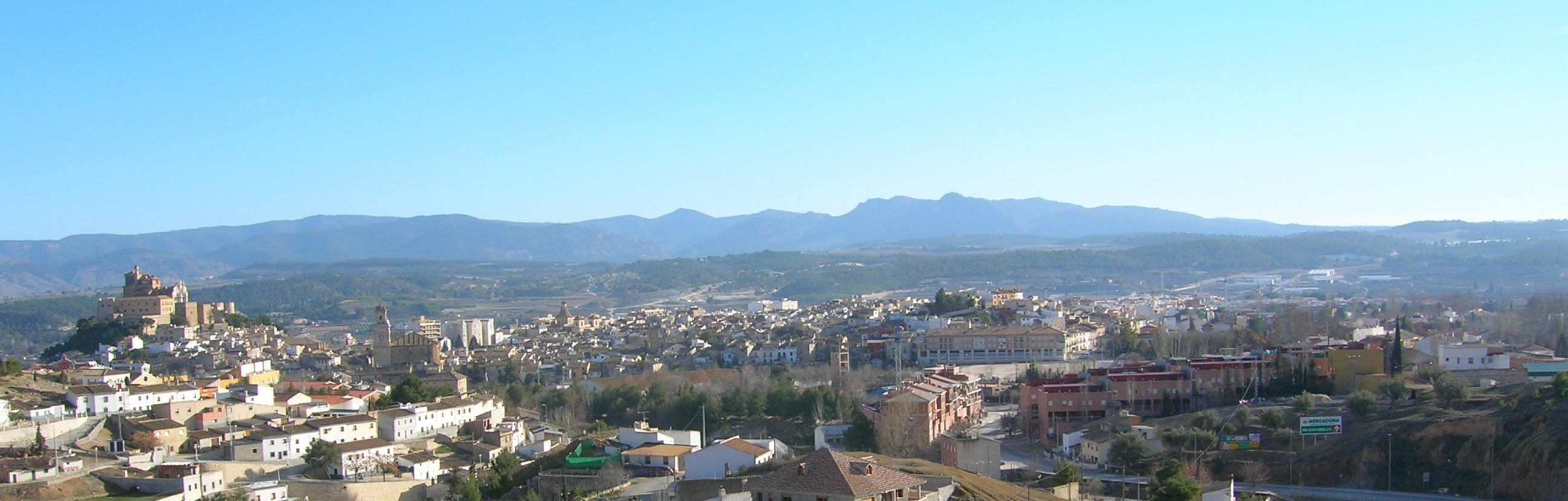 Caravaca de la Cruz, Murcia, España, vista desde el barrio de Buenavista. Caravaca de la Cruz, Murcia, España. Own picture, given to PD.